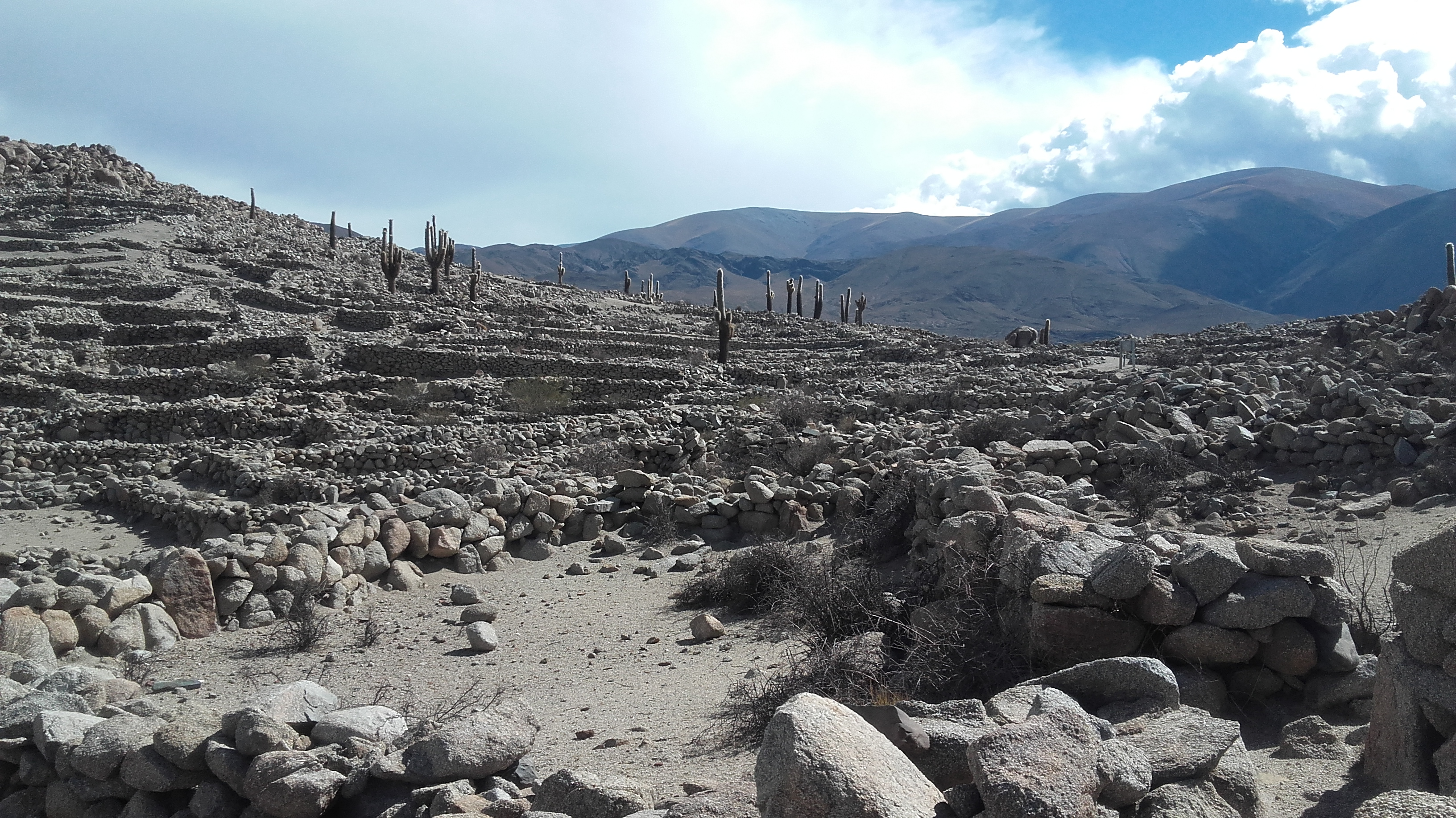 Ruinas de Tastil. Localidad de Santa Rosa de Tastil. Salta. Argentina